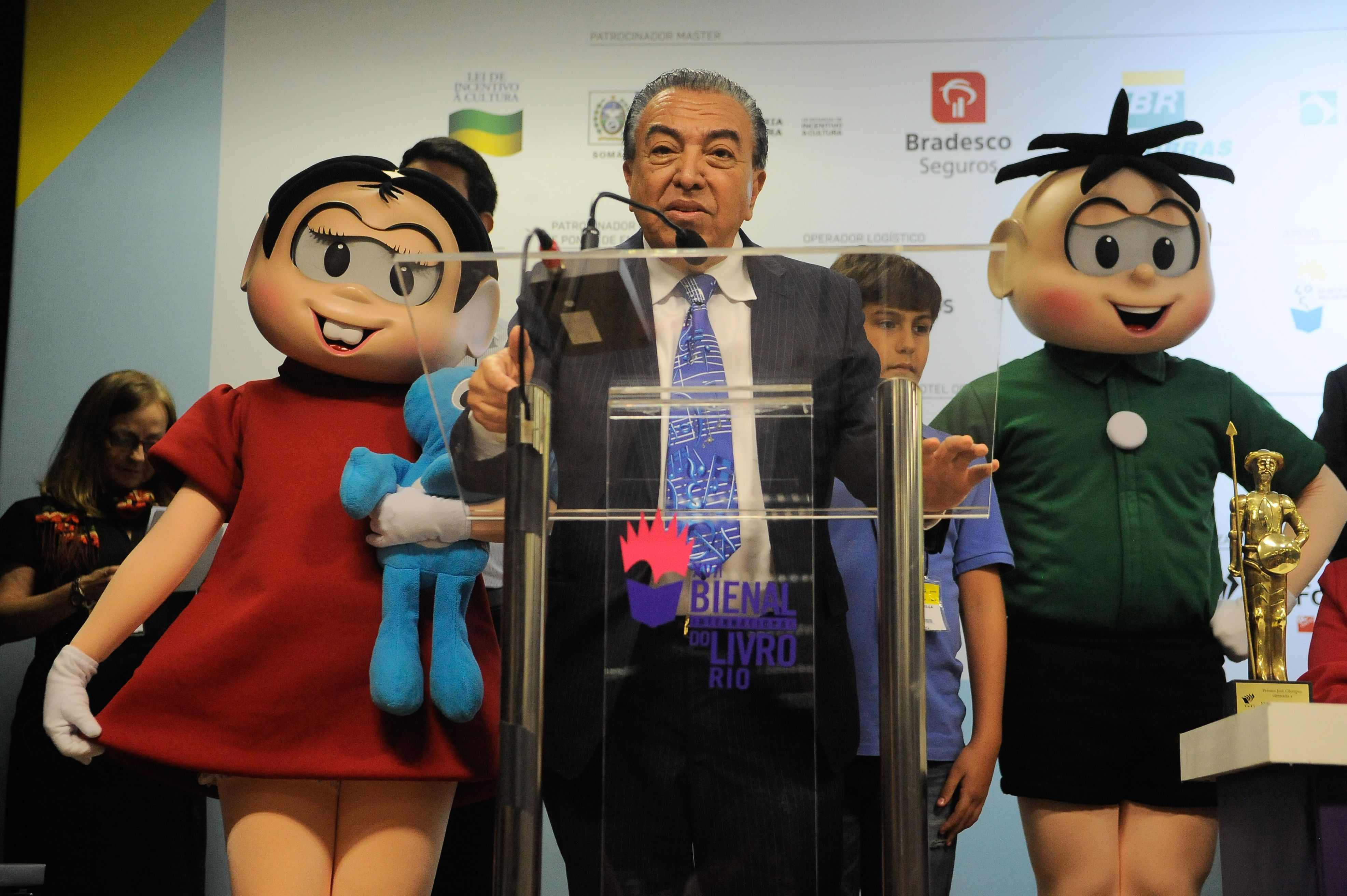 Maurício de Sousa, criador da Turma da Mônica, homenageado na 17ª Bienal Internacional do Livro do Rio de Janeiro, participa da abertura no Riocentro.